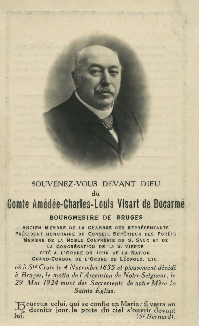 Faire-part de décès d'Amédée Visart de Bocarmé (1835-1924)